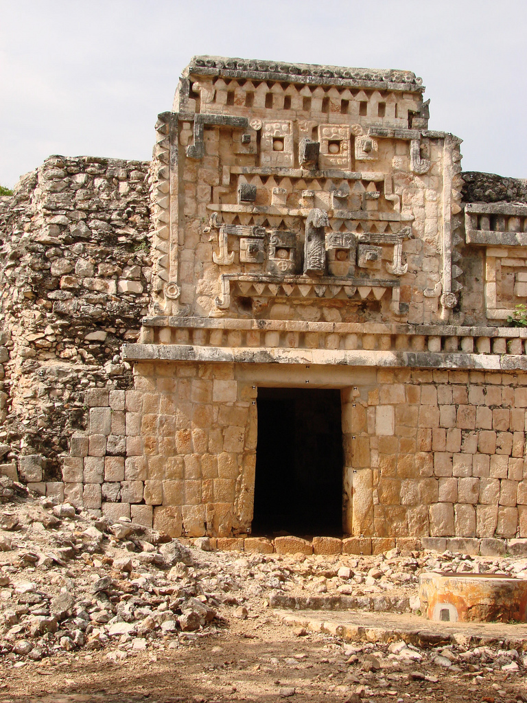 Xlapak, Yucatán, México